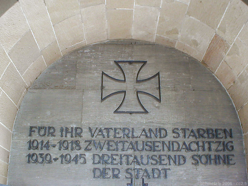 Detail aus dem Inneren des zum Kriegerdenkmal umgebauten Hafenmarktturms in Heilbronn